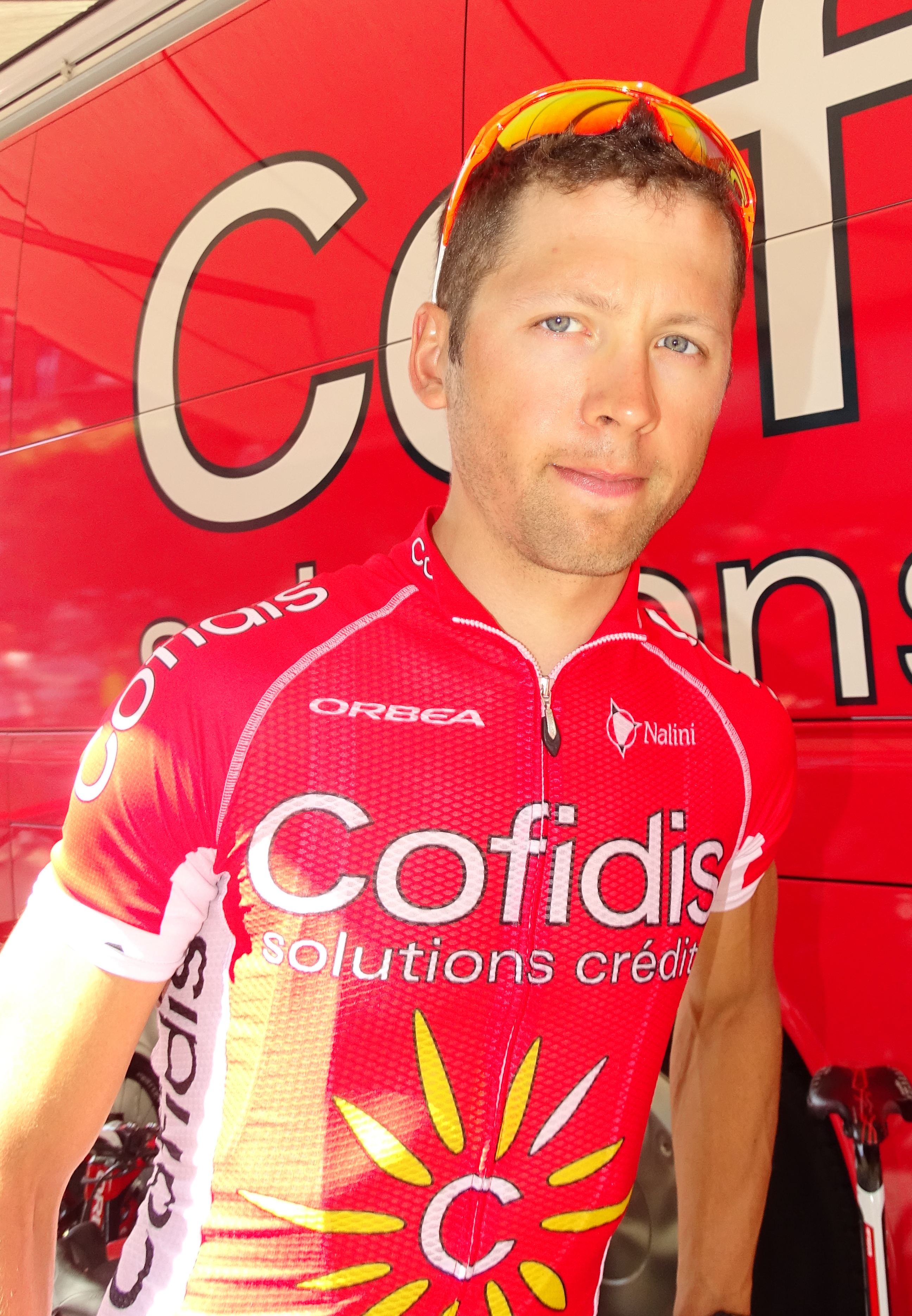 Reportage réalisé le lundi 6 juillet à l'occasion du départ de la troisième étape du Tour de France 2015 à Anvers, Belgique.